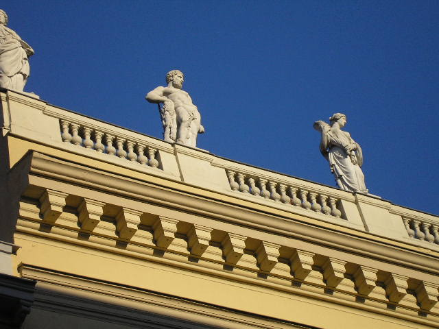 Dieses Bild stellt die Statuen auf dem Dach des Behnhauses in Lübeck dar.